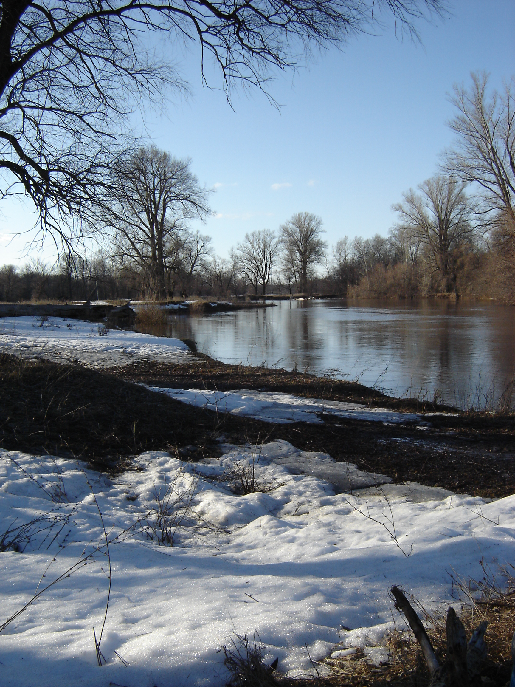 Демский заказник: Уфимский район, Башкортостан This image is related to the protected area of Russia number 0210219